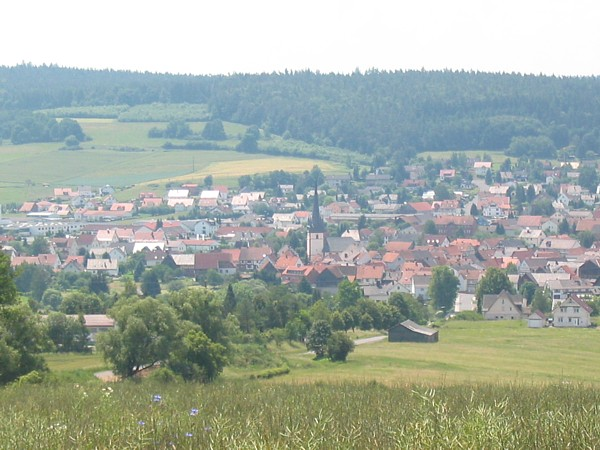 Wartenberg-Angersbach. Ortskern aus östlicher Richtung fotografiert.